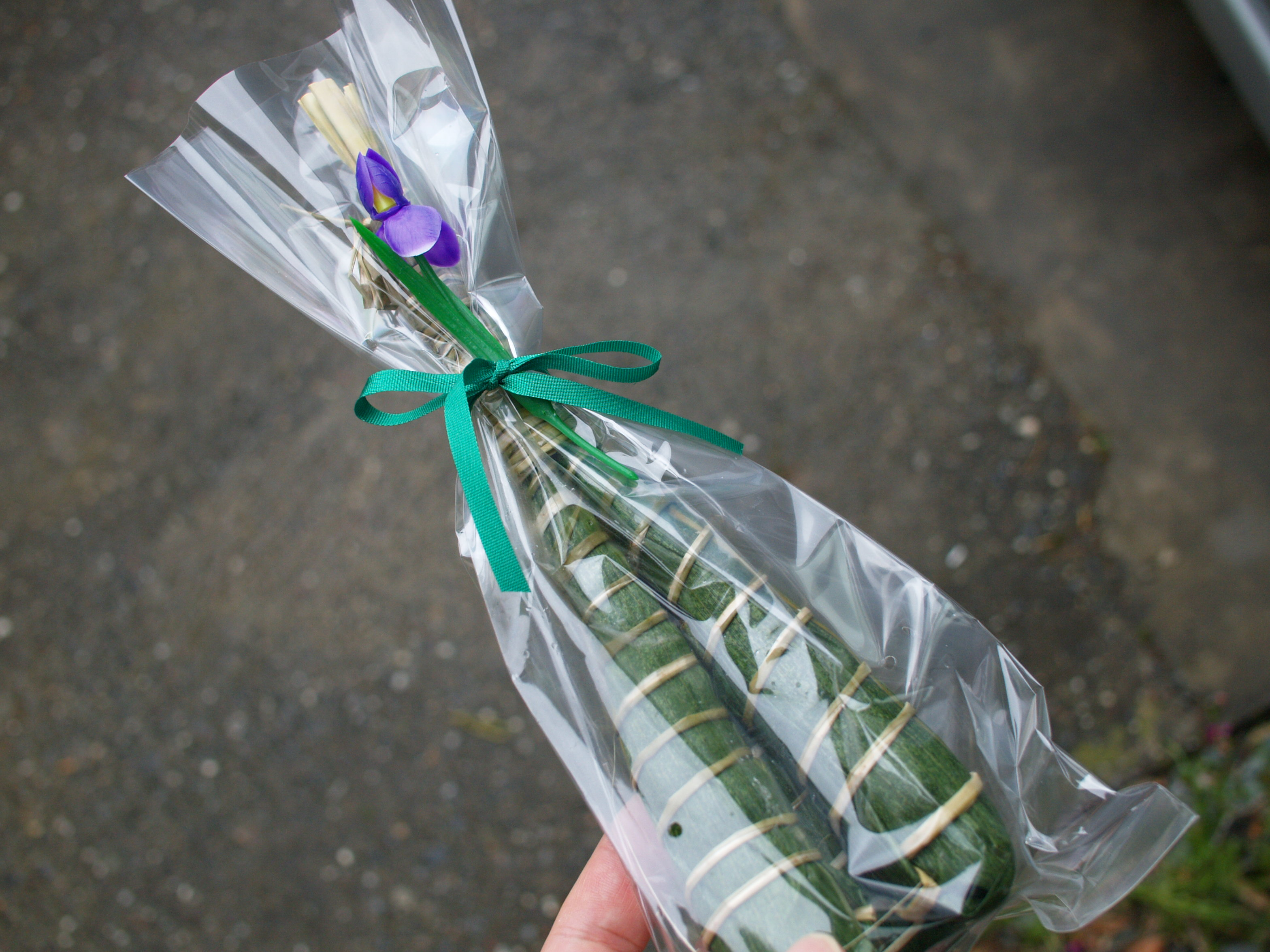 中文（香港）: 包裝精美的日本粽